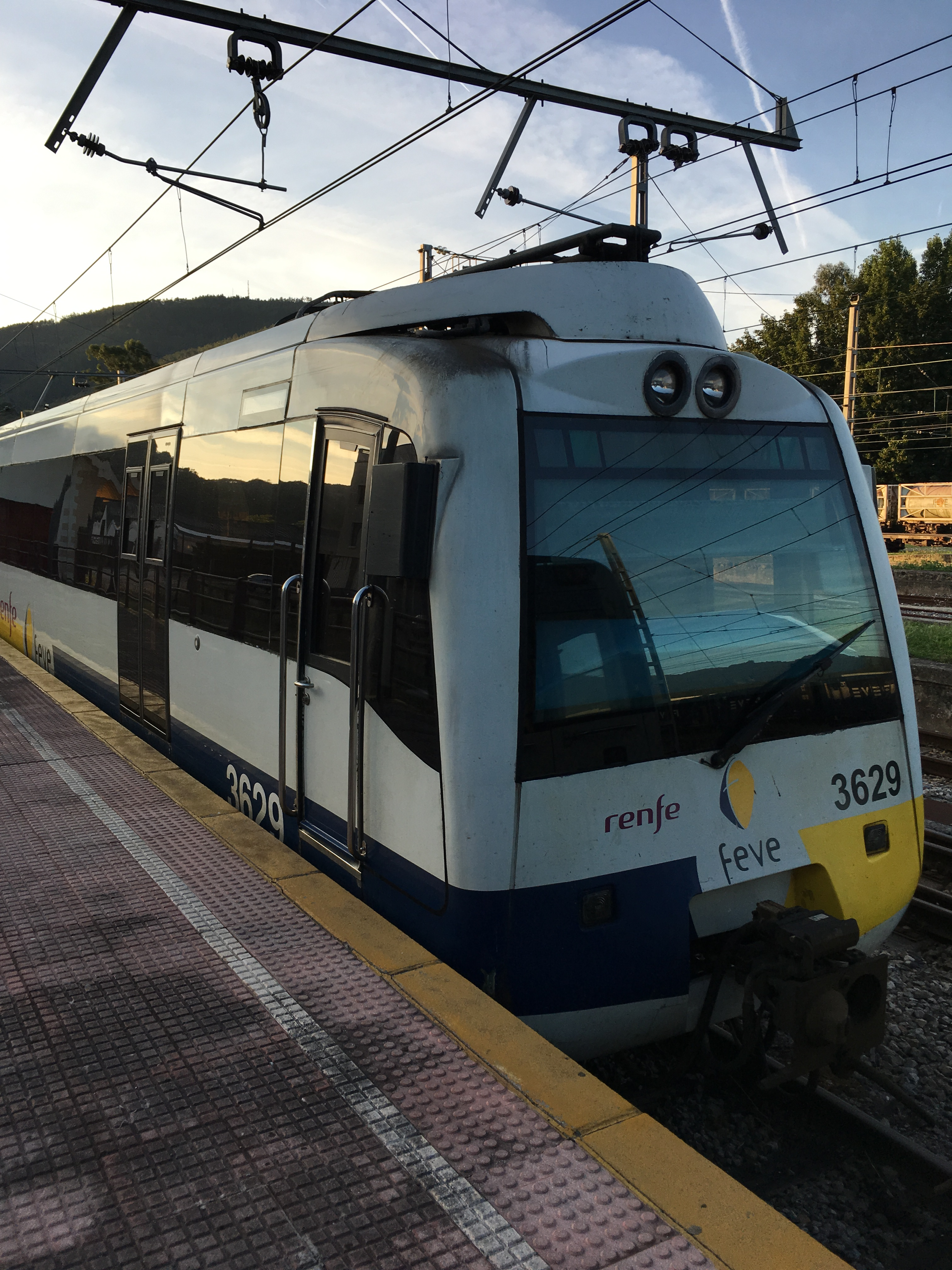 feve serie 3600